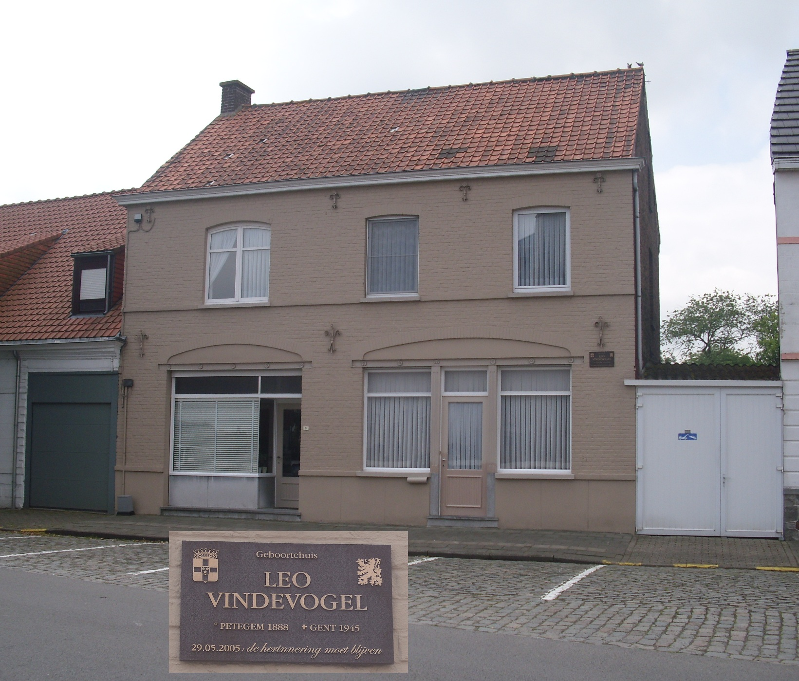 Geboortehuis van Leo Vindevogel - Petegemplein - Petegem-aan-de-Schelde - Wortegem-Petegem - Oost-Vlaanderen - België